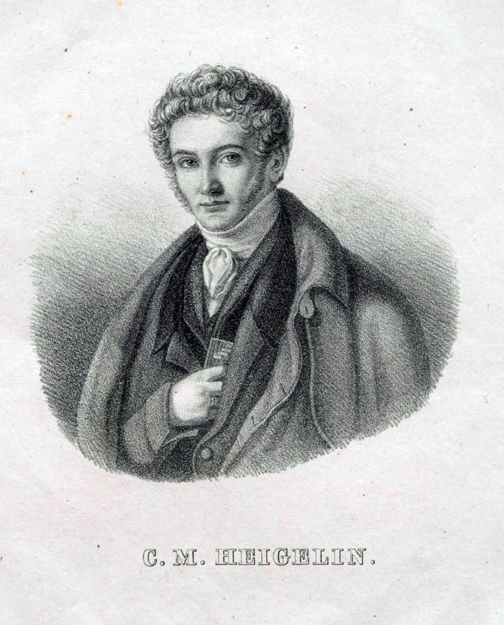 Bildnis Karl Marcell Heigelin (1798-1833)